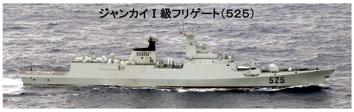 １２月１０日（月）午前５時頃、海上自衛隊第５航空群所属「Ｐ－３Ｃ」（那覇） 及び第２護衛隊「あまぎり」（佐世保）が、仲ノ神島の南西約４４ｋｍ（与那国島 の南南東約４９ｋｍ）の海域を太平洋から東シナ海に向けて北東進する中国海軍 ソブレメンヌイ級ミサイル駆逐艦２隻、ジャンカイⅠ級フリゲート１隻及びジャ ンカイⅡ級フリゲート１隻の合計４隻を確認した。 なお、これら４隻の艦艇は、１１月２８日（水）午前９時から午前１０時頃に かけて、宮古島の北東約１１０ｋｍの海域を東シナ海から太平洋に向けて南東進 し、その後、沖ノ鳥島西南西約５５０ｋｍの海域において、艦載ヘリコプターの 飛行訓練及び洋上補給を行っていたことを確認した。